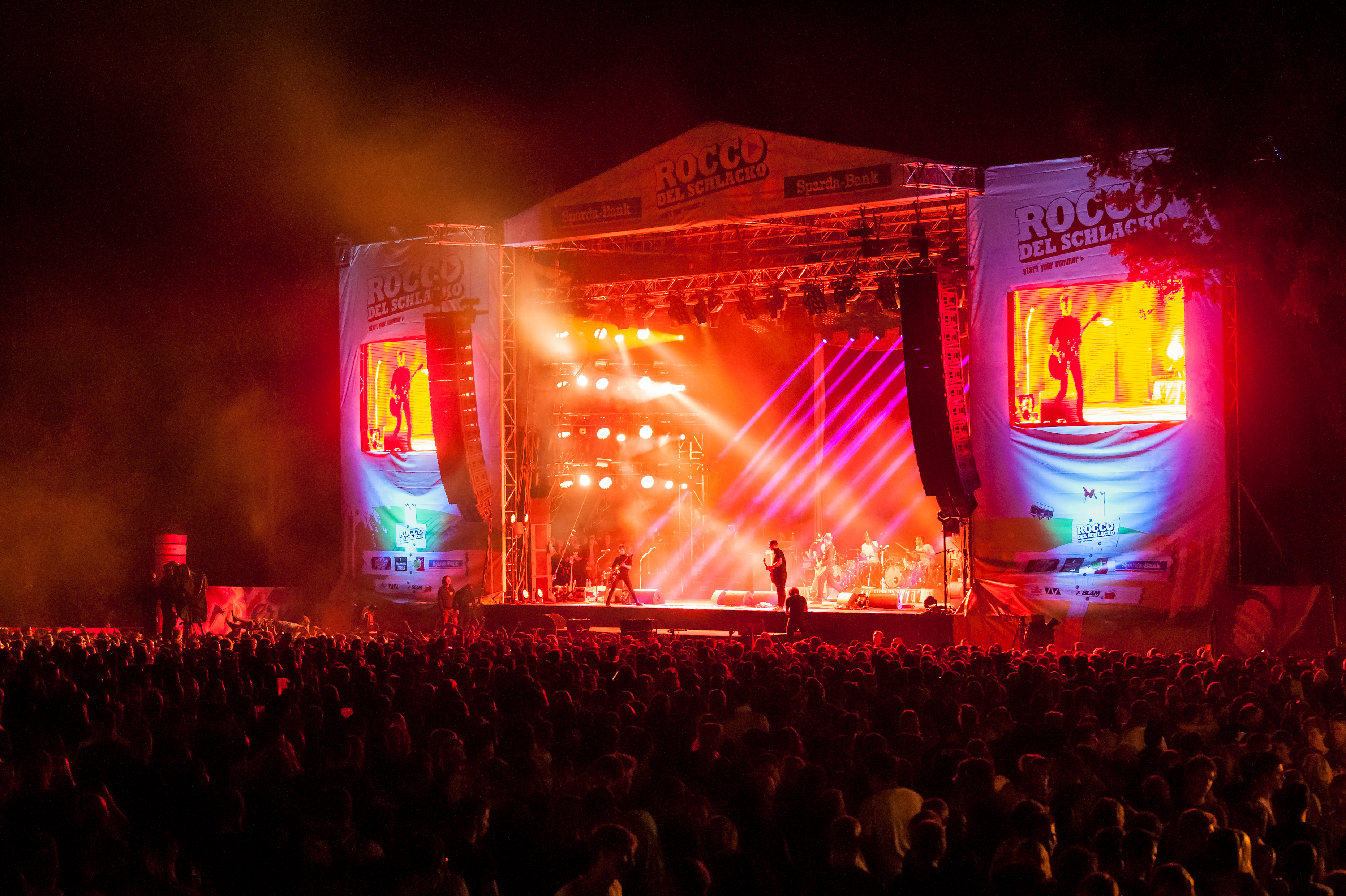 Rockband Beatsteaks beim Festival, Rocco del Schlacko 2012.